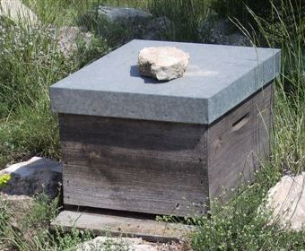 Image:Dadant_12_maig__2006_063.jpg